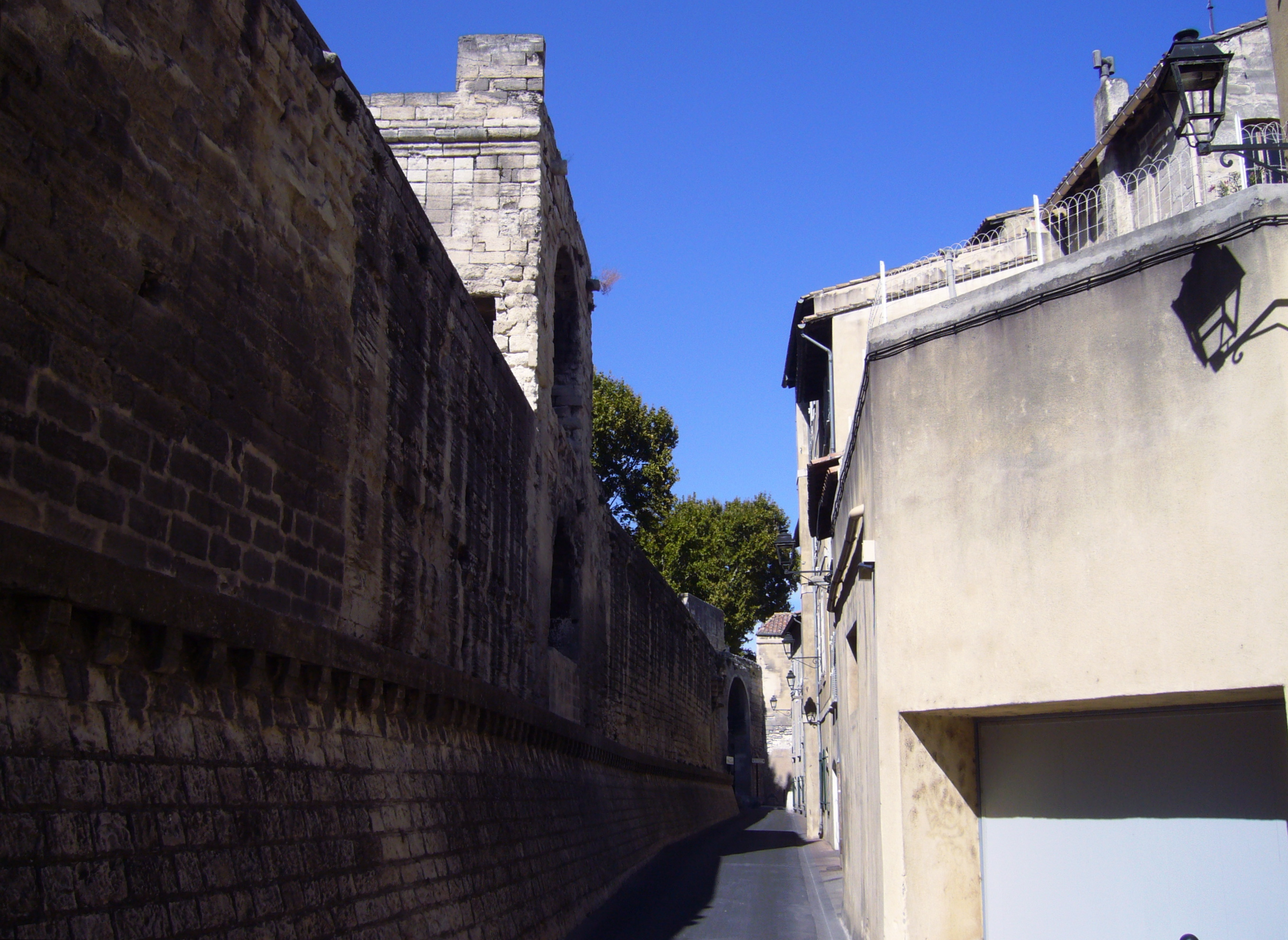 Rempart du Rhône en Avignon.